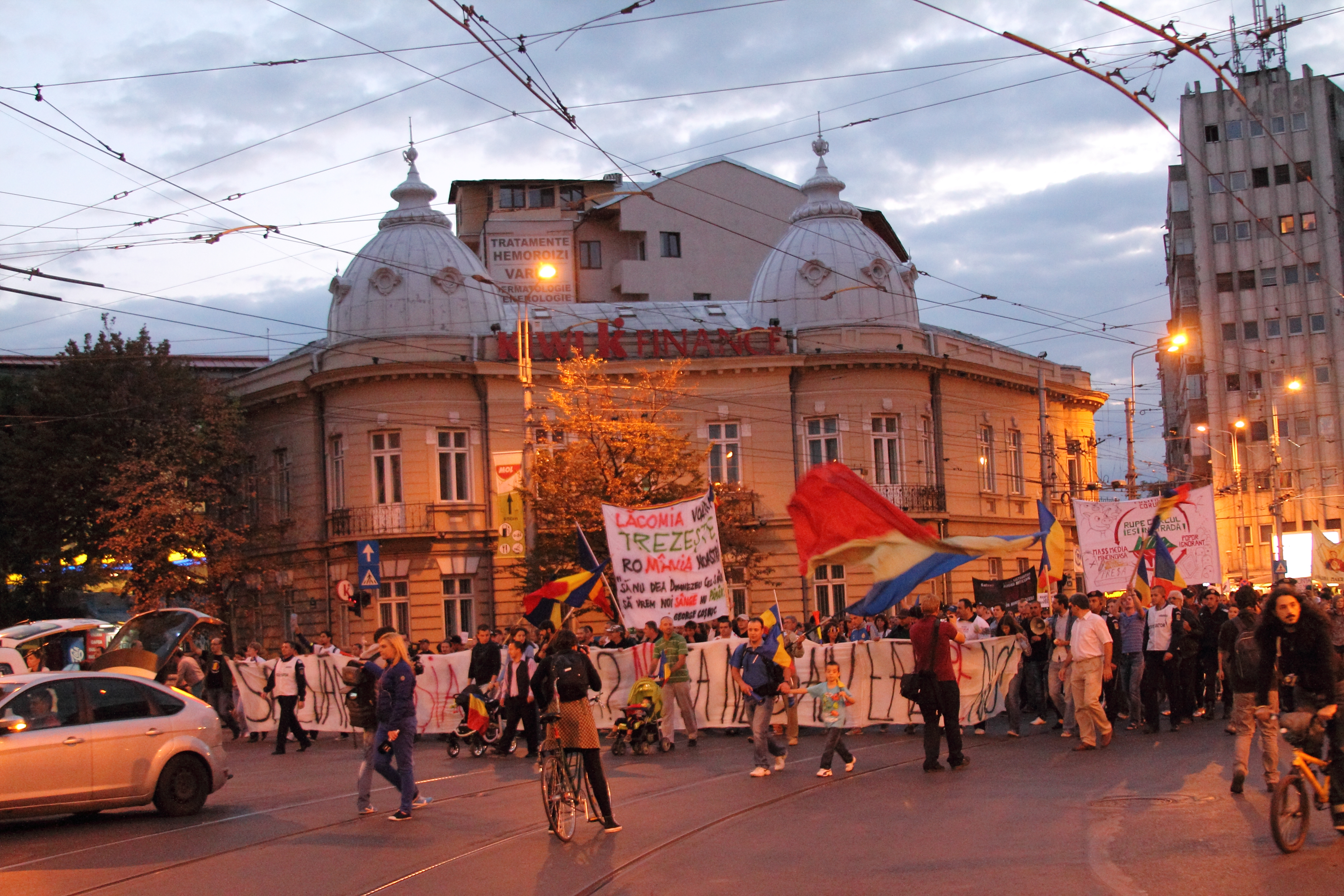 Clădire monument istoric, Bd. Carol I, nr. 64, Bucuresti sector 2